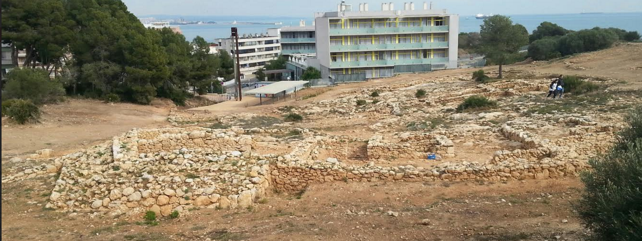 Jaciment arqueològic "la Cella", Cap Salou